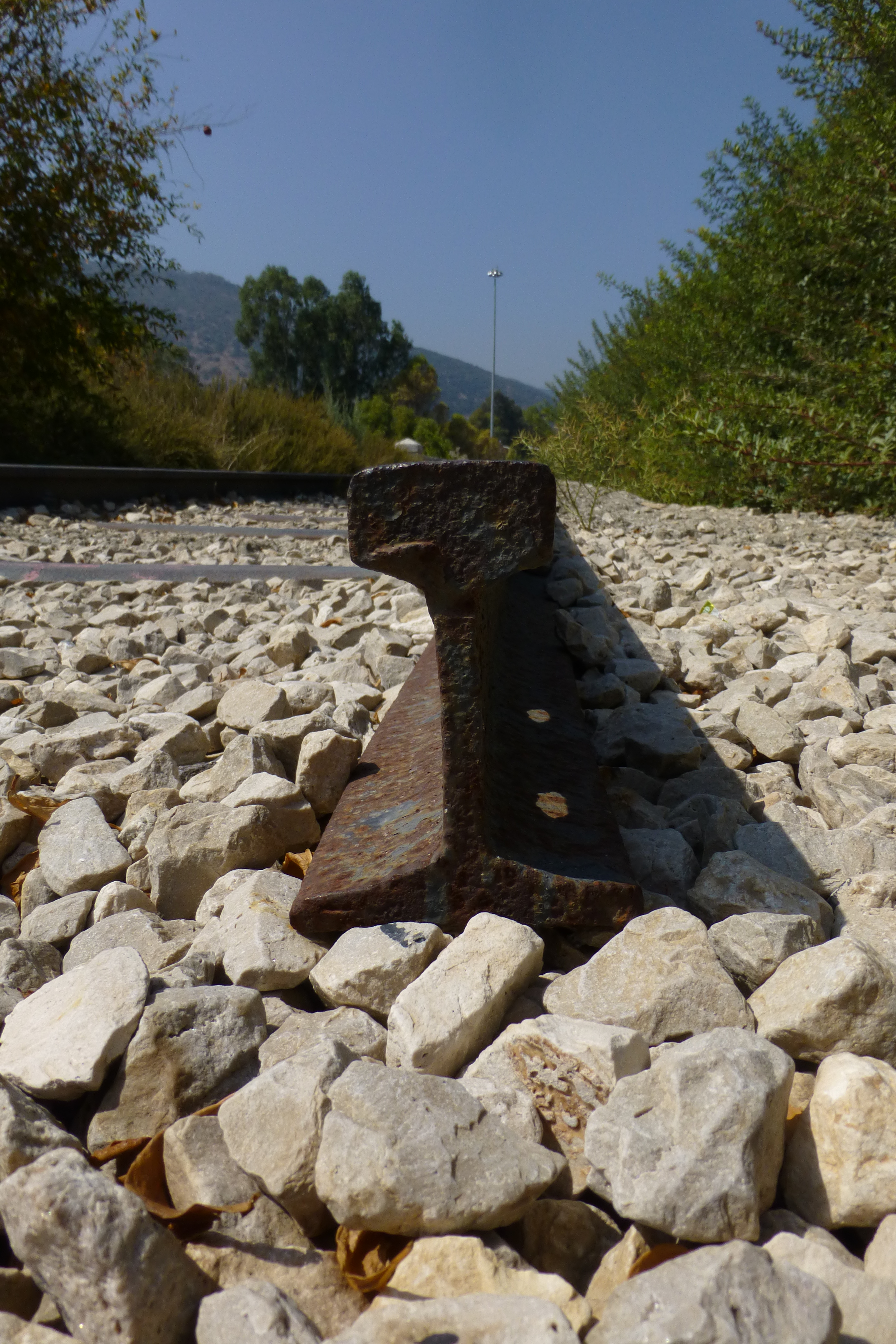 רכבת העמק - מעבירי מים והסוללה - צומת העמקים